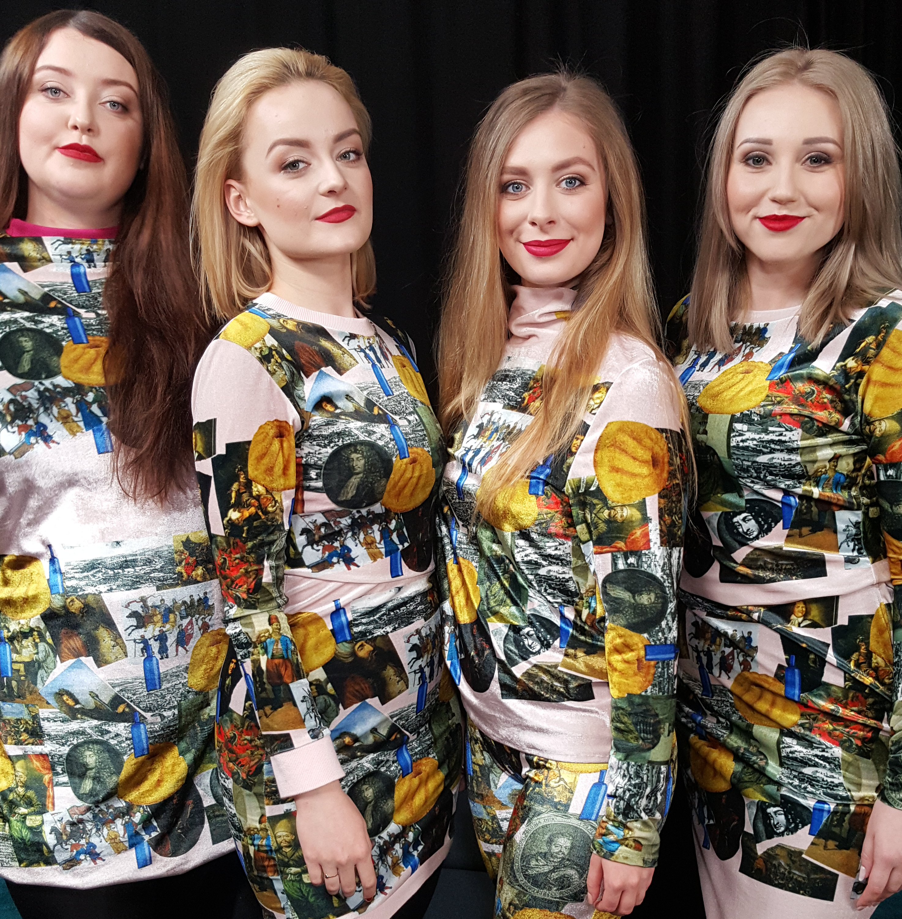 Polski zespół Tulia w 2019 roku.